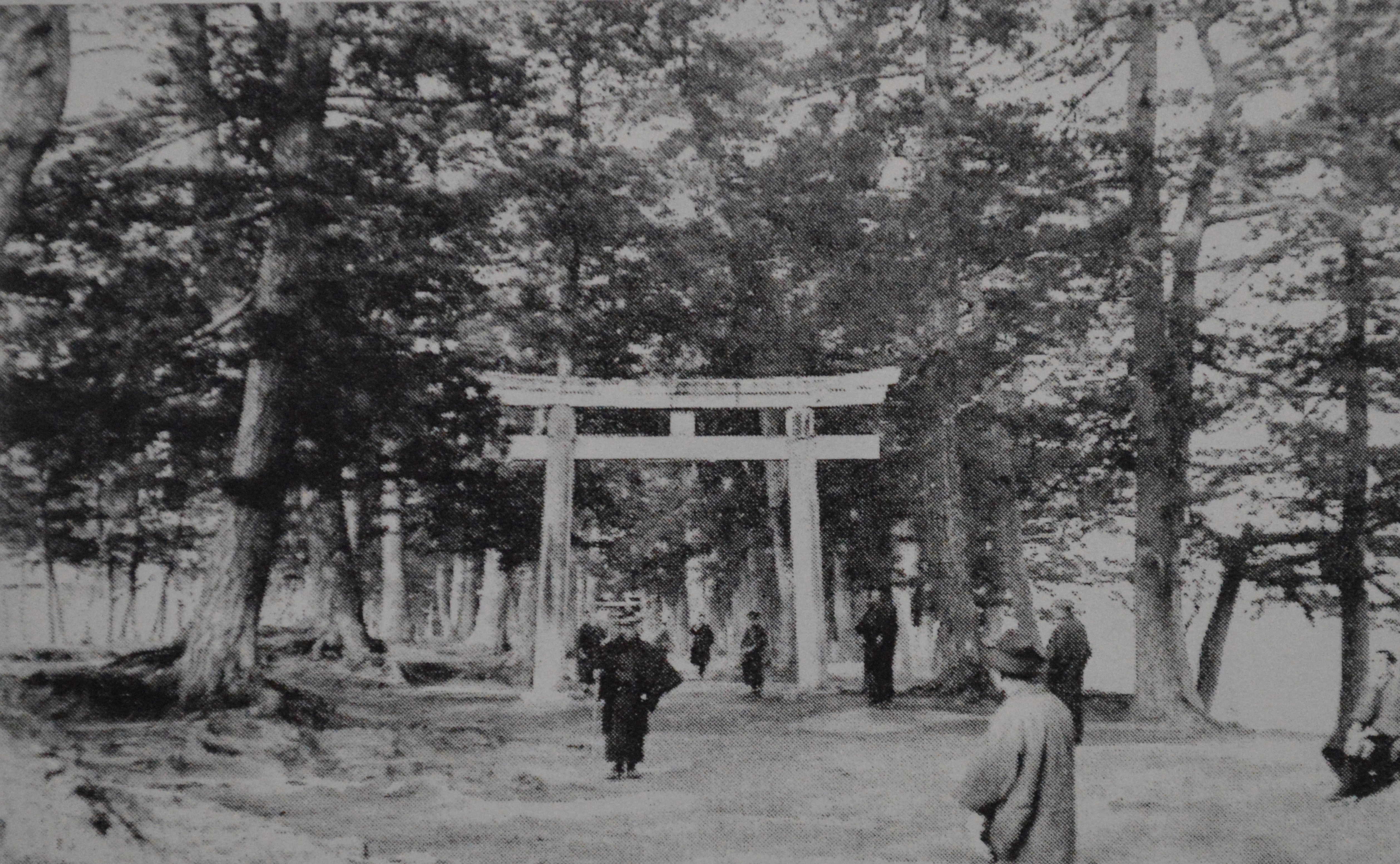 愛知県碧海郡桜井村（現・愛知県安城市）にある桜井神社。大正時代。